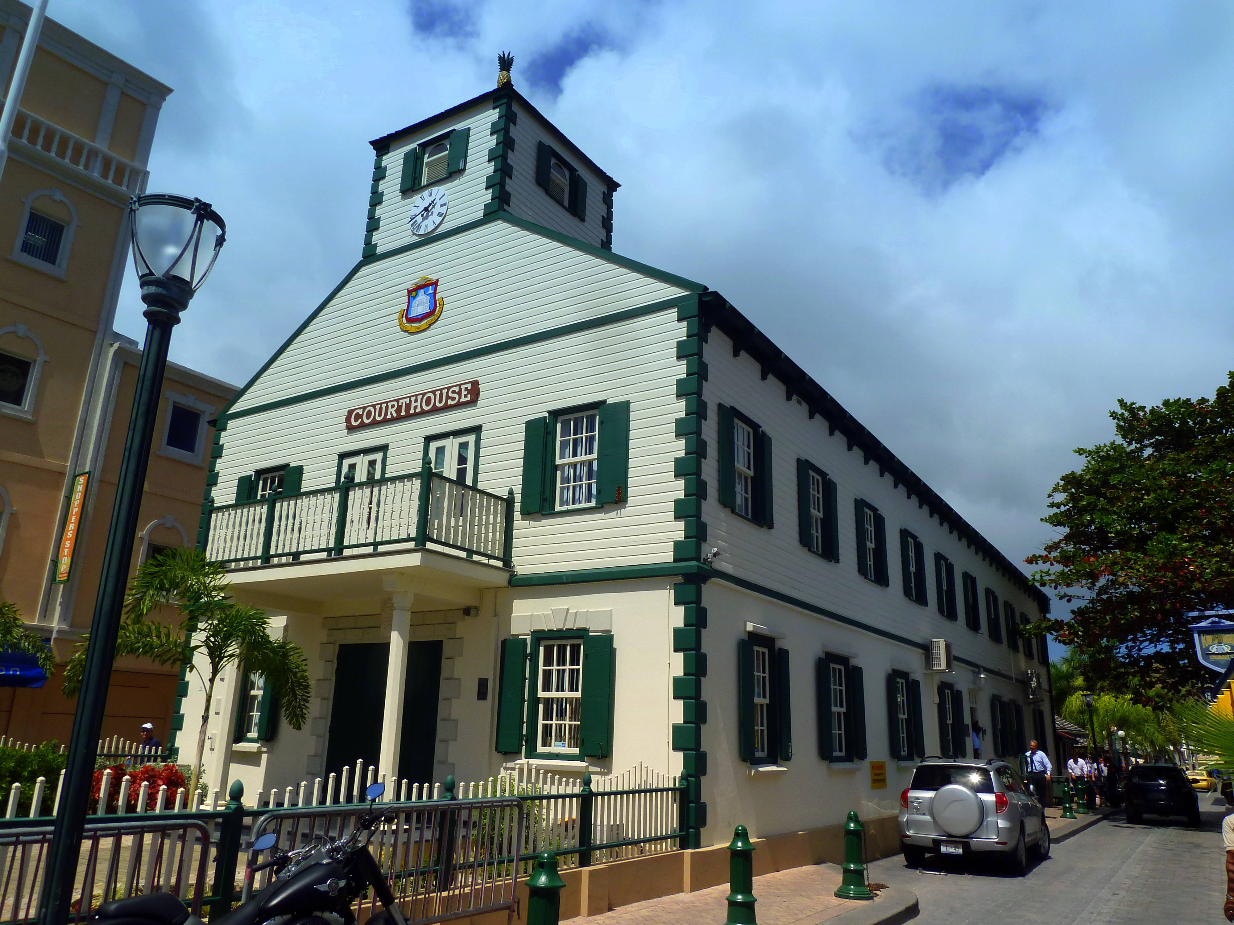 St. Maarten, Karibik - Philipsburg – Hendrikstraat - Courthouse